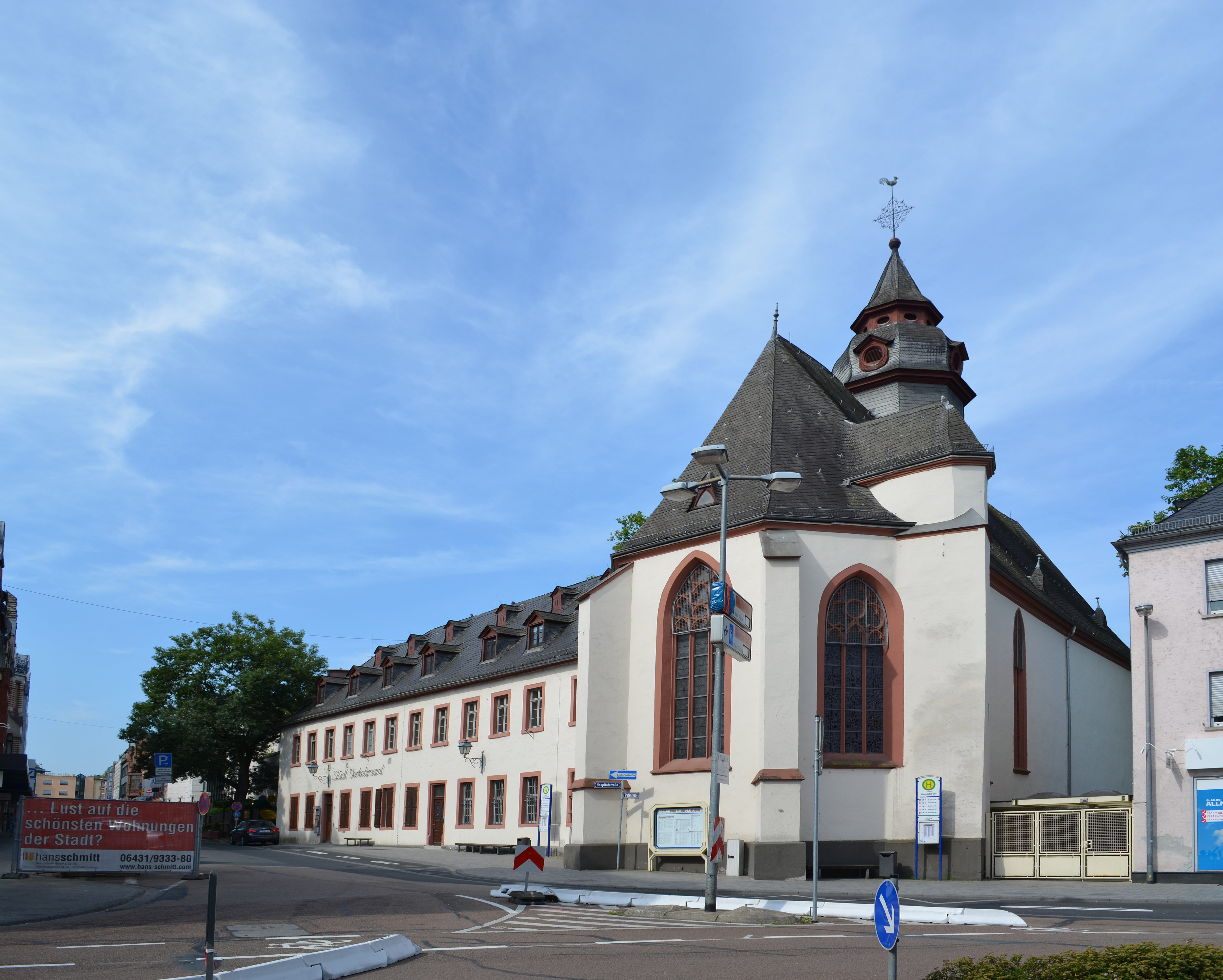 Limburg, Hospitalstraße 2, Wilhelmitenkloster